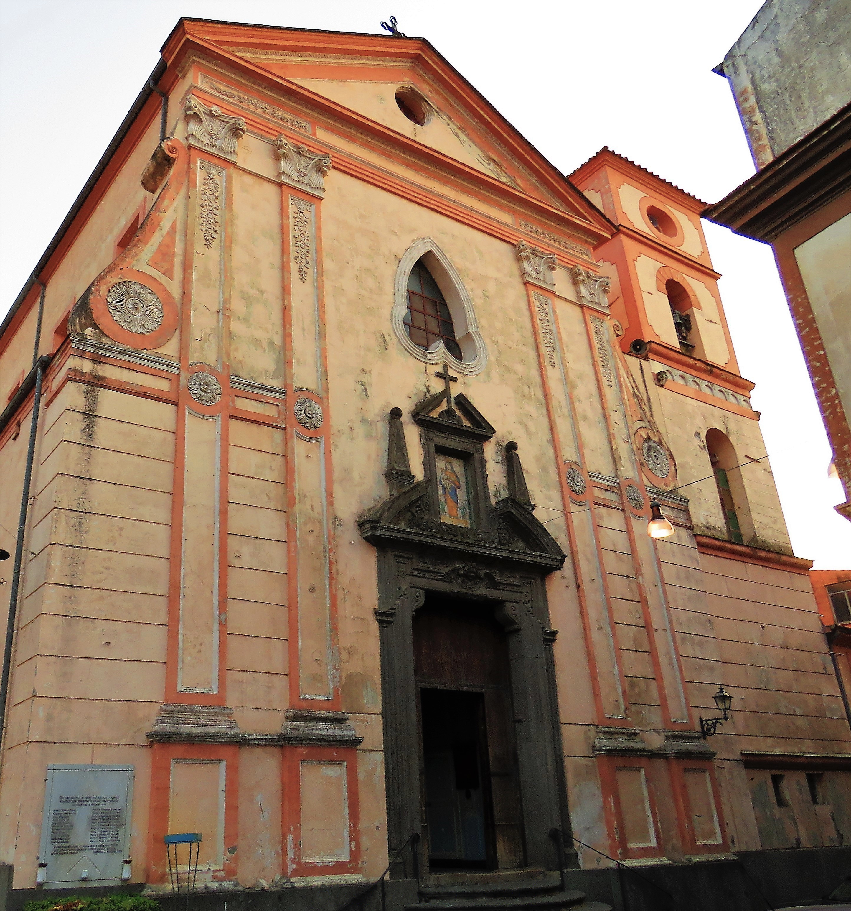 Parrocchia di S.Maria Delle Grazie, Quindici (AV)